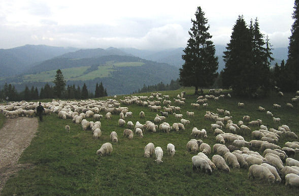 Wypas owiec na hali w Pieninach, wrzesień 2004. Fotografia udostępniona przez Giraff camelopardalis na bazie licencji GNU FDL.